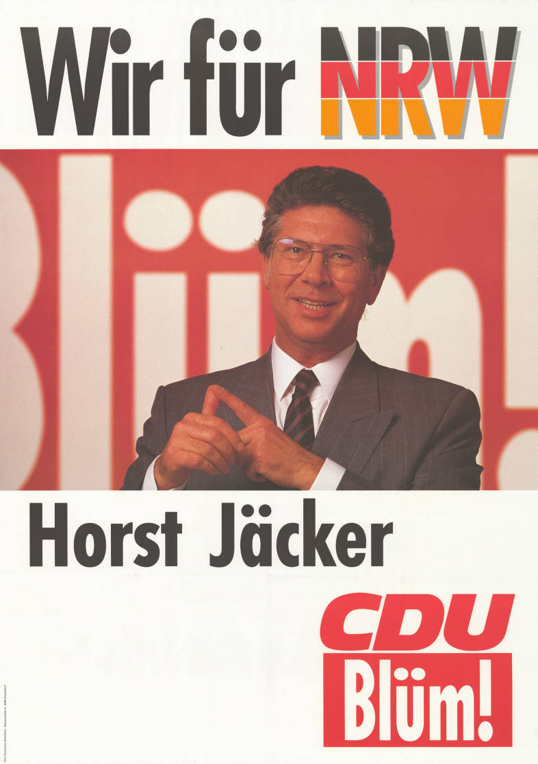 Wir für NRW Blüm Horst Jäcker CDU Blüm! Abbildung:Porträtfoto - NationalfarbenPlakatart:Kandidaten-/Personenplakat mit PorträtAuftraggeber:CDU Nordrhein-Westfalen, DüsseldorfObjekt-Signatur:10-009 : 1114Bestand:Landtagswahlplakate Nordrhein-Westfalen (10-009)GliederungBestand10-18:Landtagswahlplakate Nordrhein-Westfalen (10-009) » CDULizenz:KAS/ACDP 10-009 : 1114 CC-BY-SA 3.0 DE